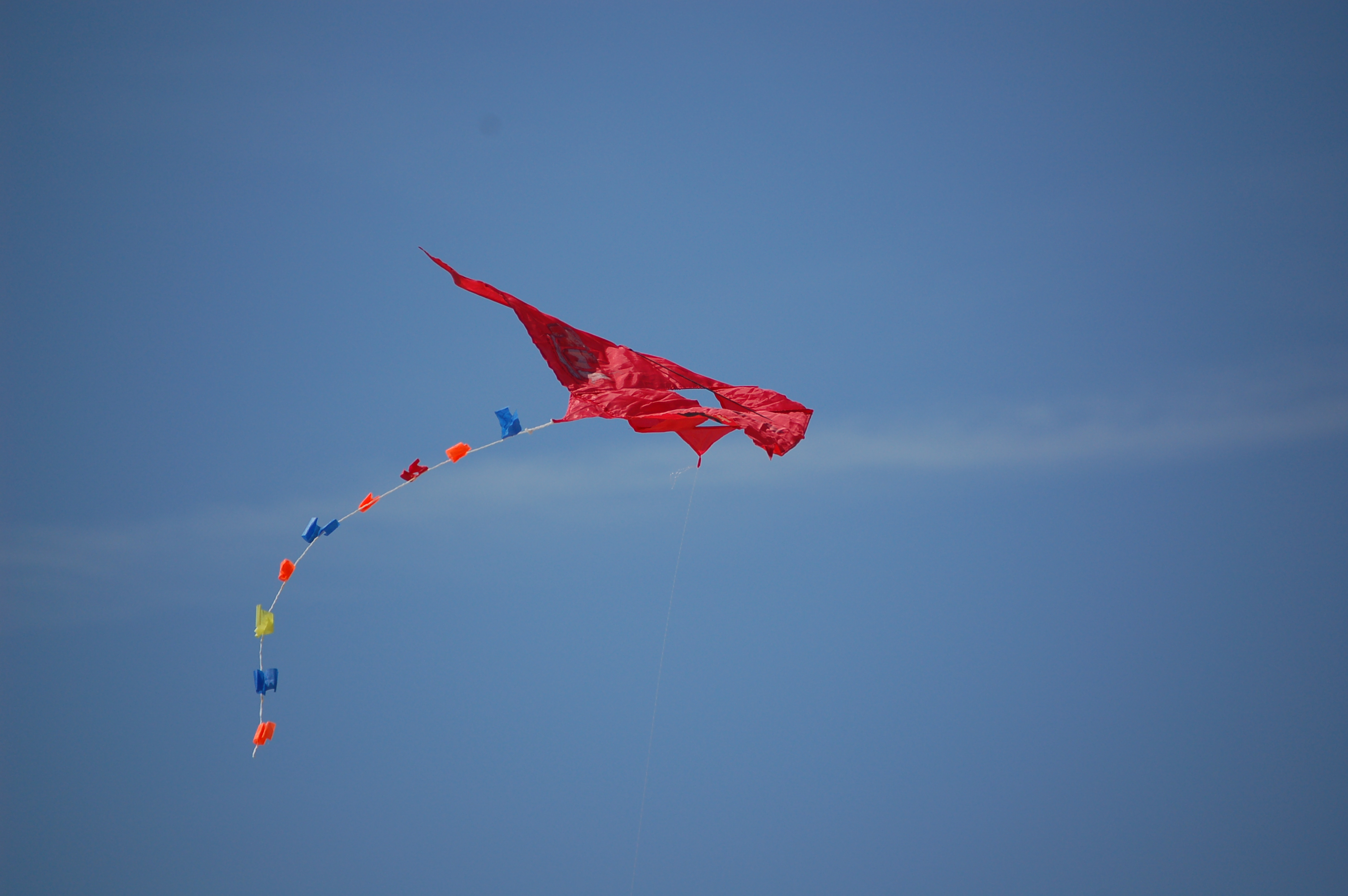 Cerf Volant Rouge Toulon (France) Avril 2007